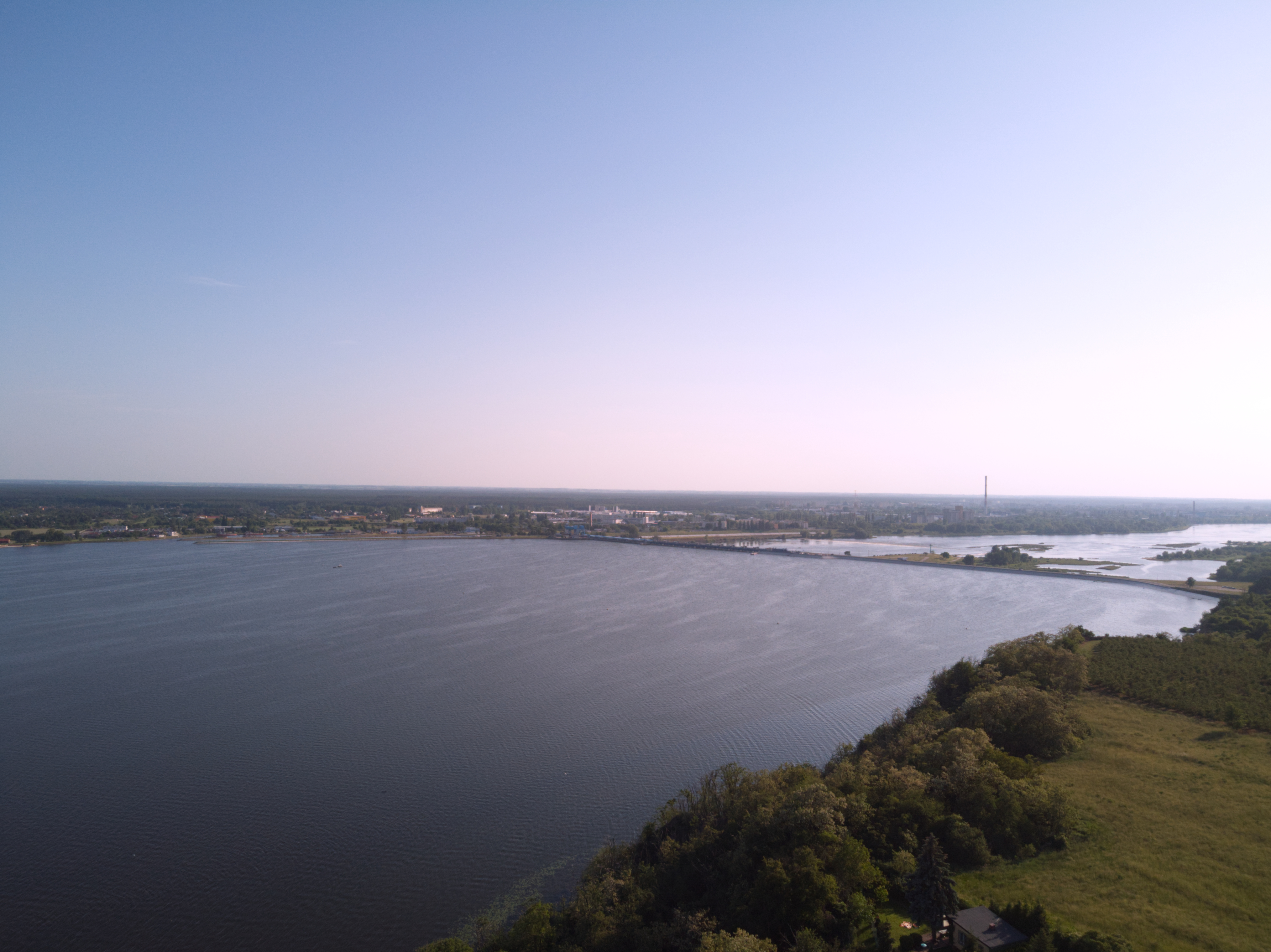 Zalew Włocławski (2020 r.)